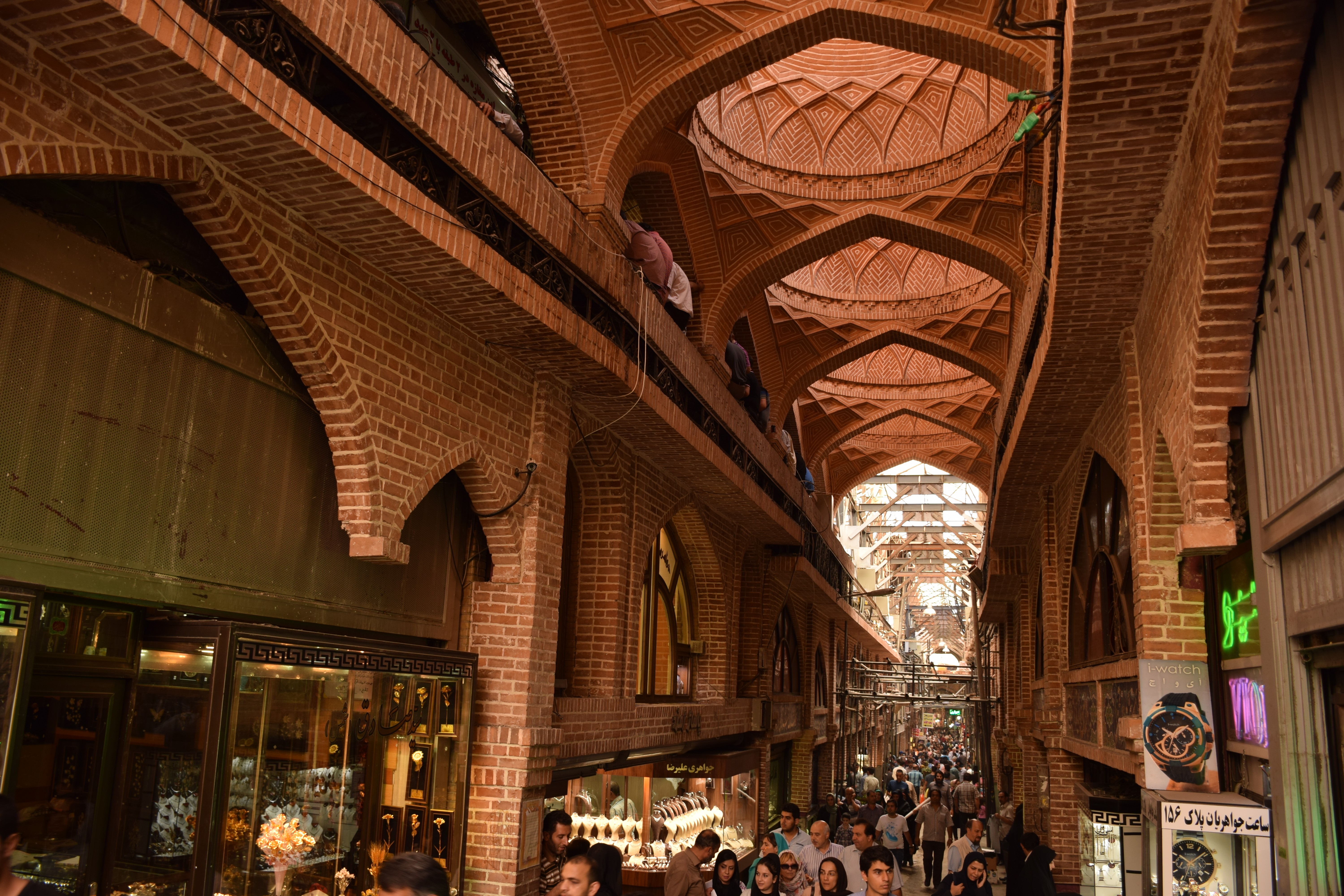 مجموعه بازار تهران